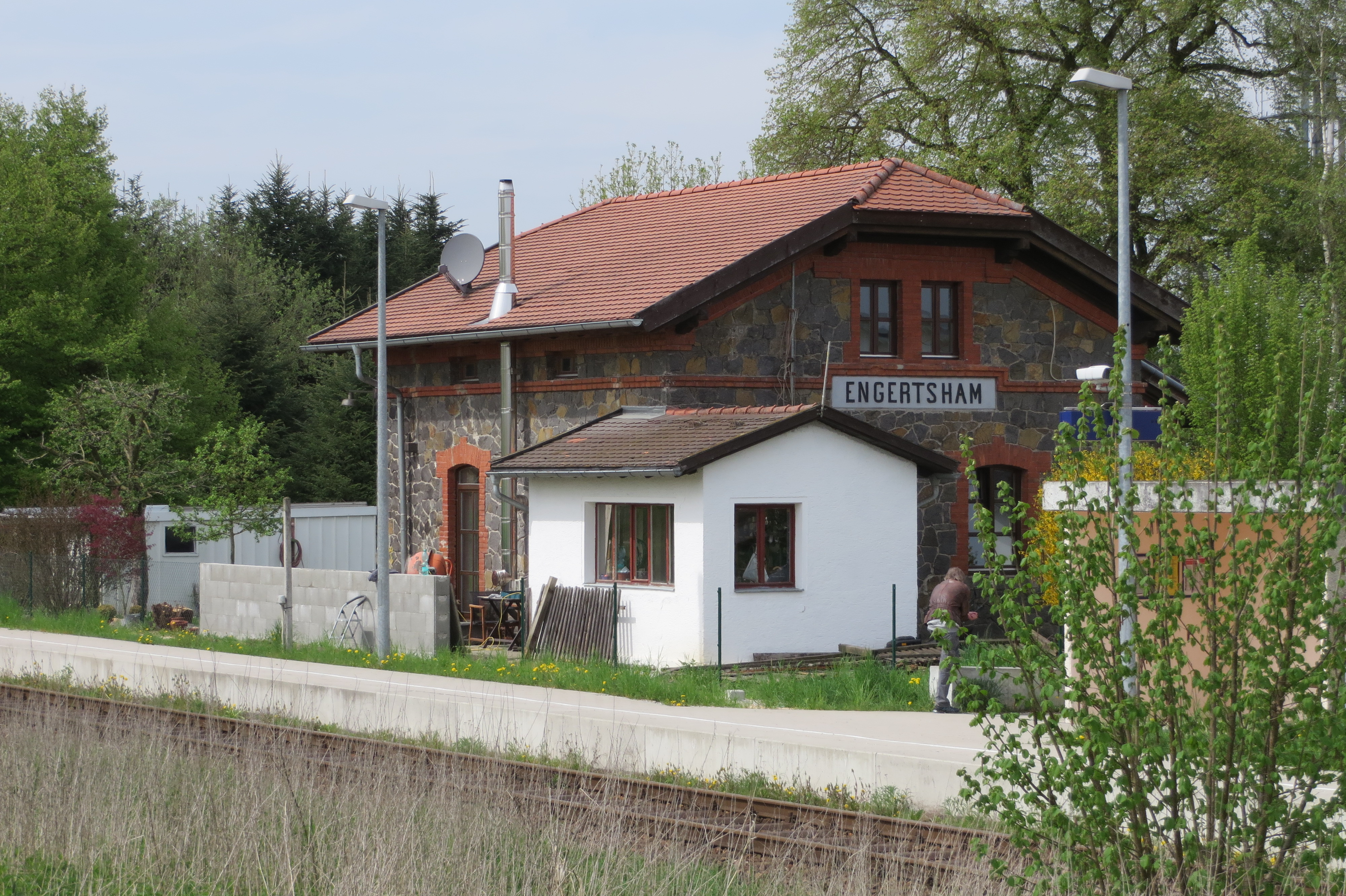 Bahnhof Engertsham, Bahnstrecke Passau–Neumarkt-Sankt Veit